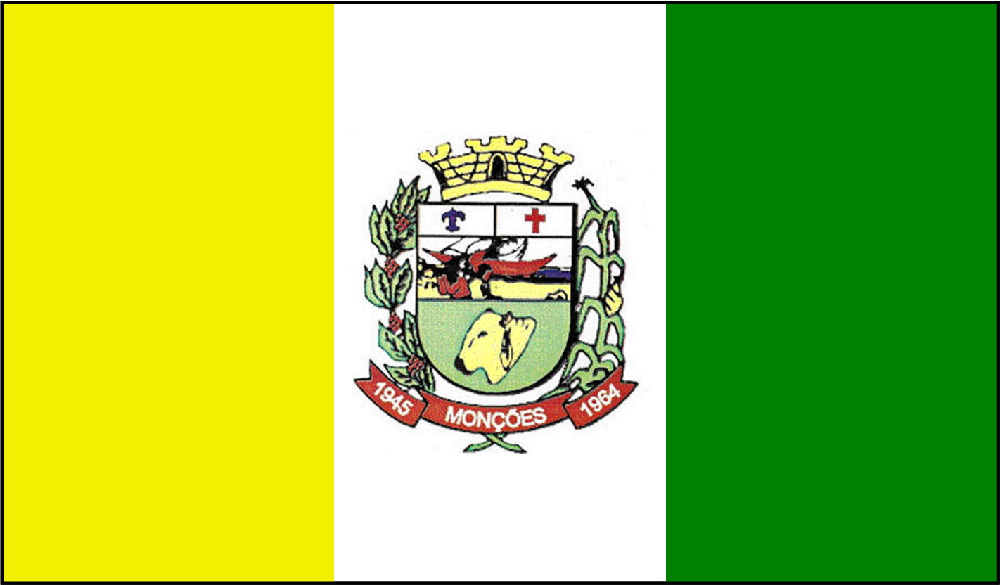 Bandeira_do_Município_de_Monções